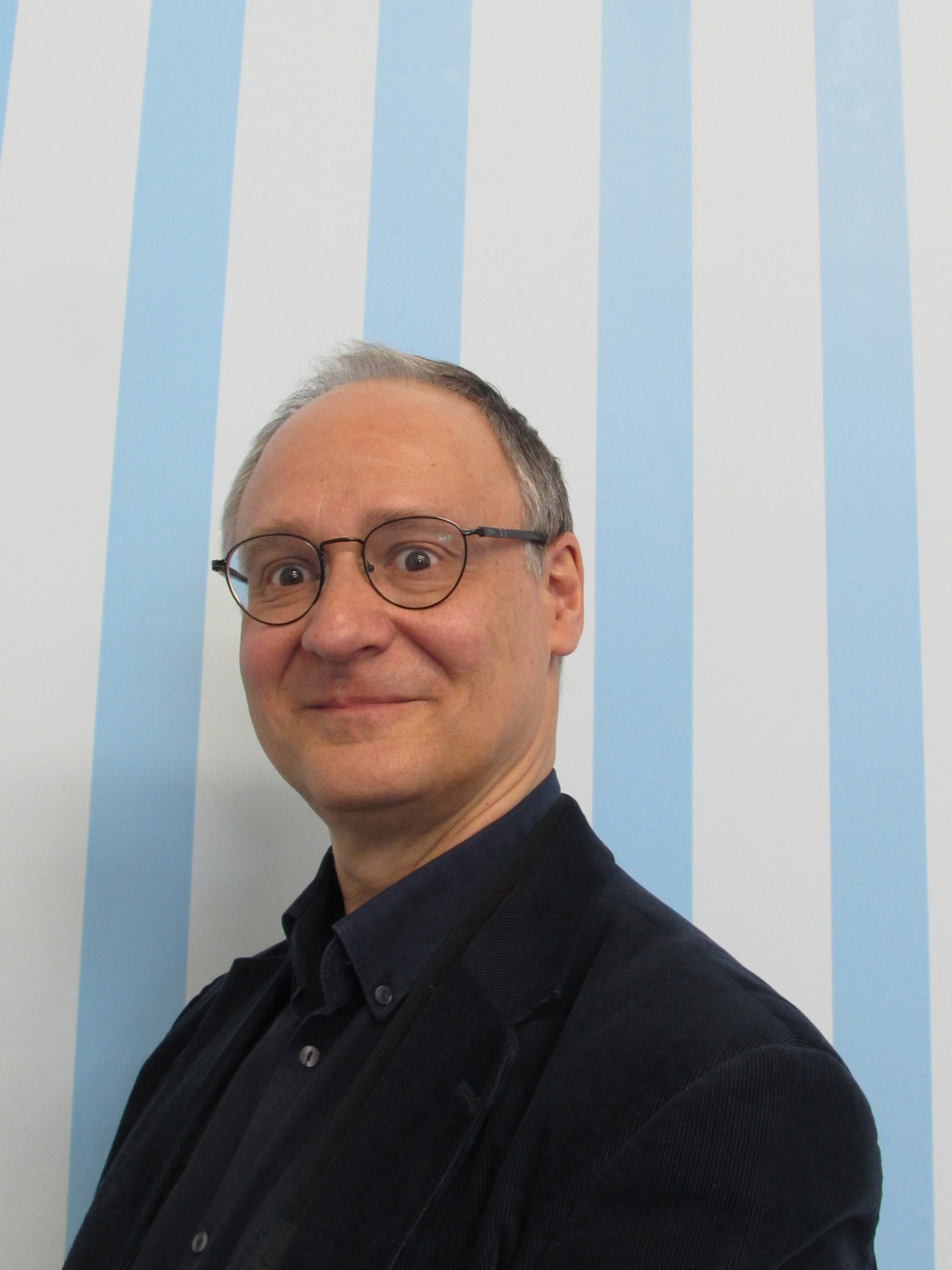 Thierry Groensteen